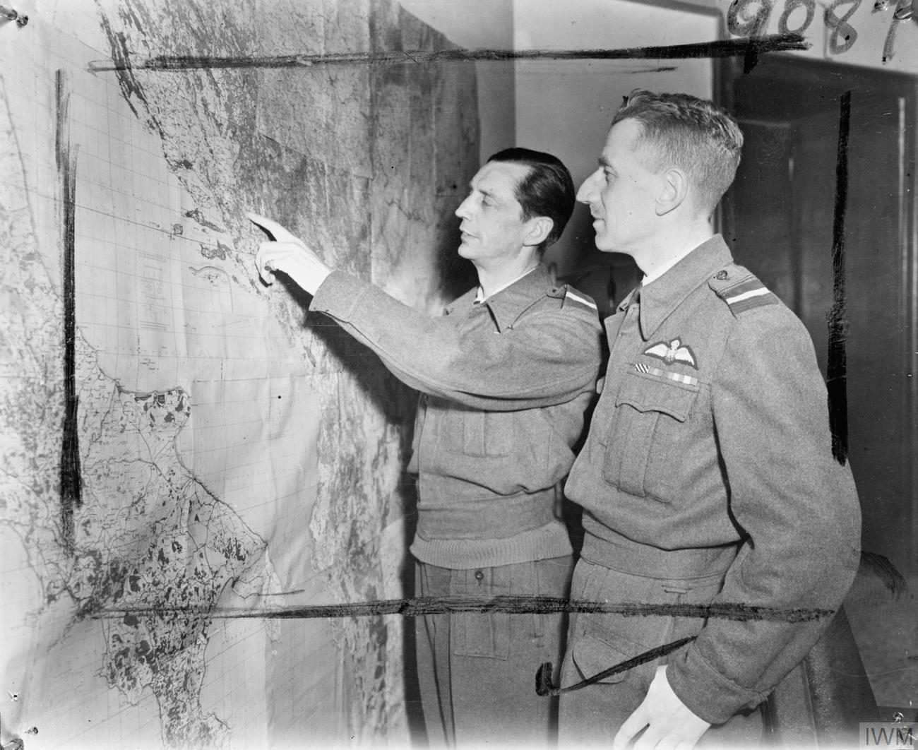 Der kommandierende Luftwaffenoffizier der Balkan Air Force William Elliott informiert seinen Nachfolger Air Vice-Marshal George Mills über den letzten Stand der Operationen auf dem Balkan (im BAF Hauptquartier auf Bari, Italien).